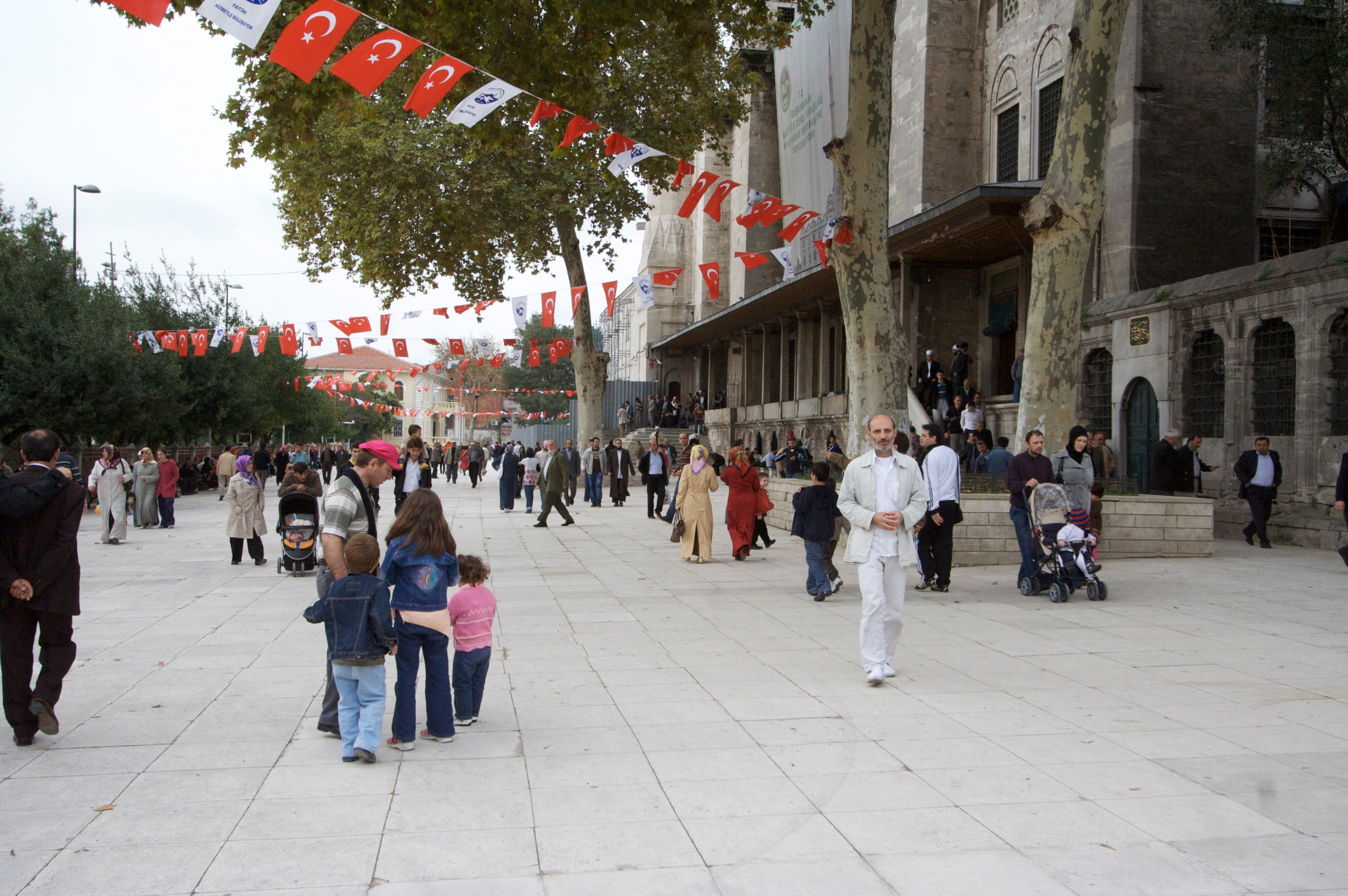 Fatih Camii bahçesi